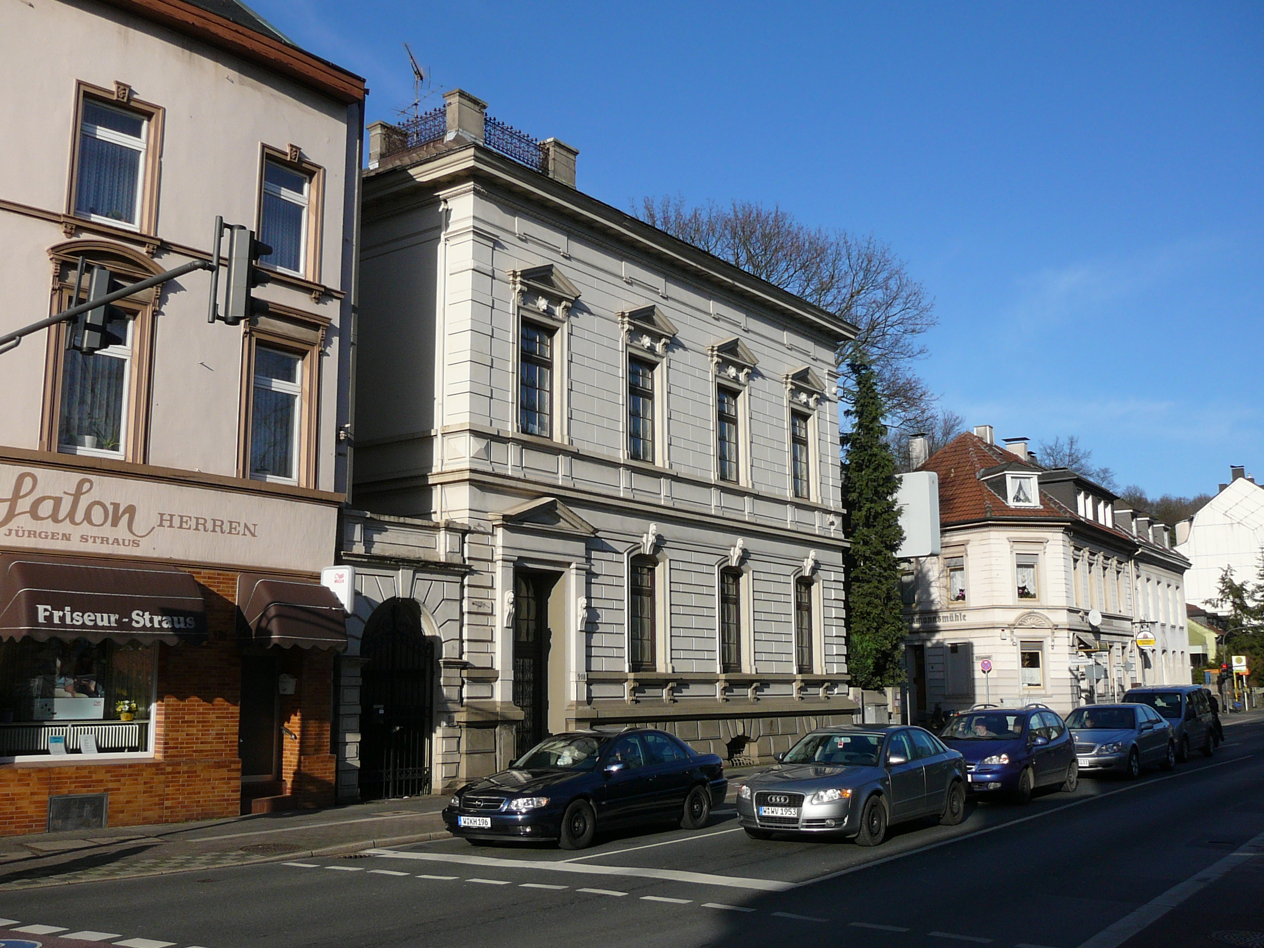 Varresbecker Str., Wuppertal